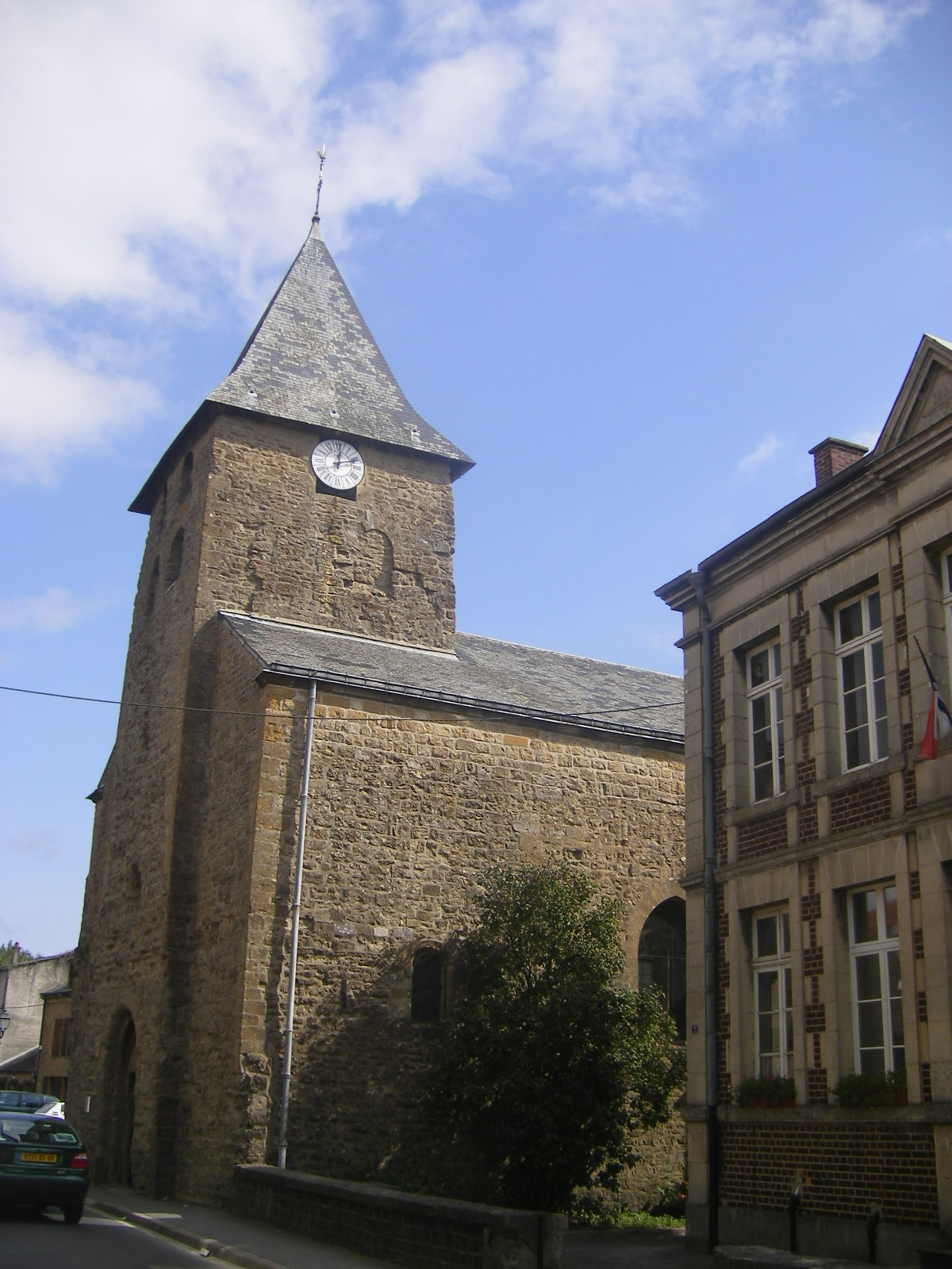 Église Saint-Jean-Baptiste de Warcq (Ardennes, France) .